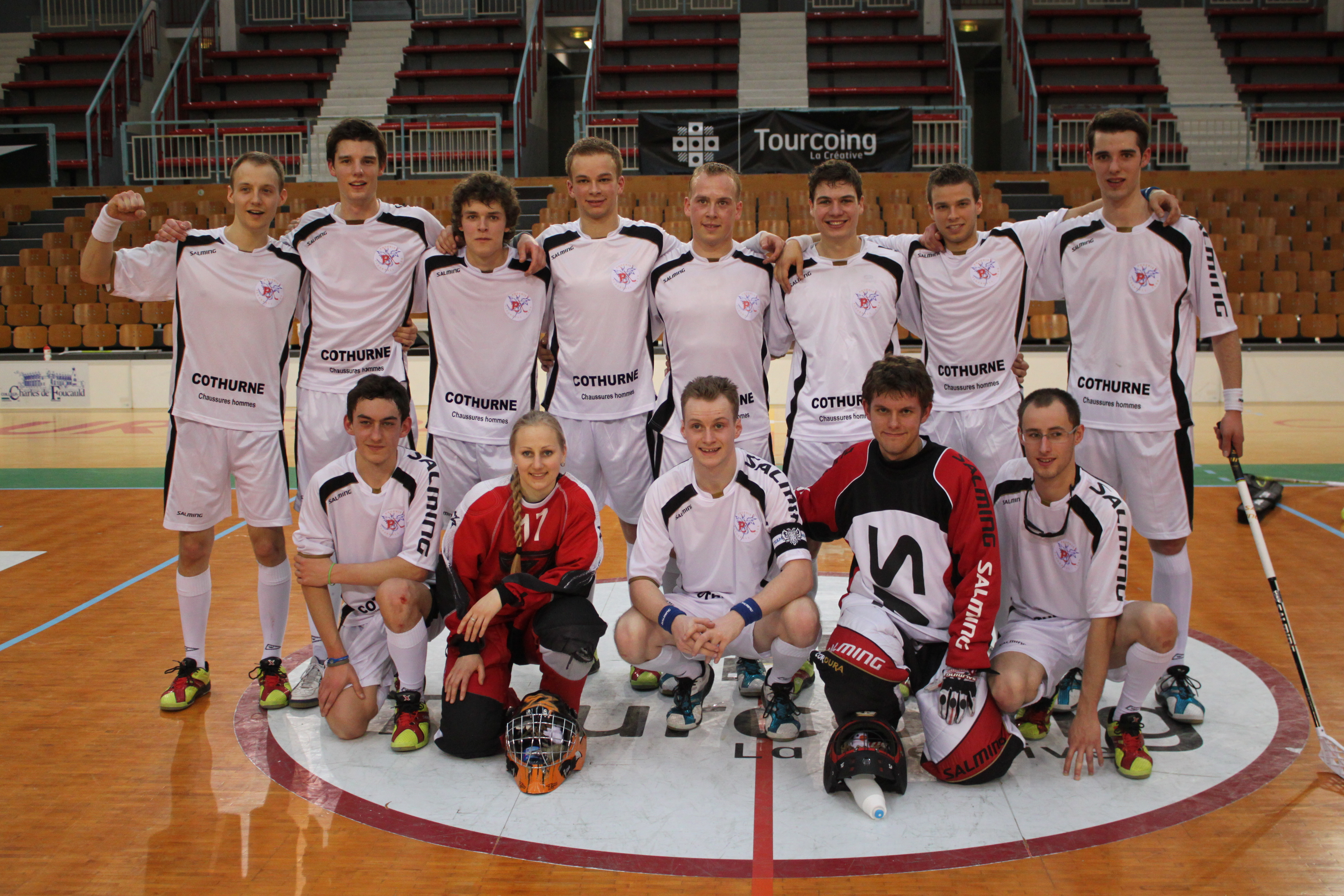 Photo de l'équipe de floorball de Wasquehal aux playoff du Championnat de France D2 à Tourcoing en mai 2012.